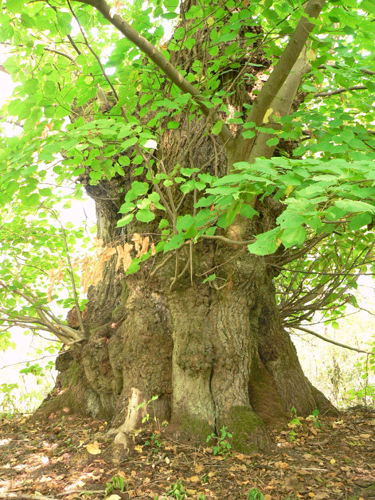 Alte Linde (Eva-Linde) neben der Stauffenburg, Naturdenkmal (ND-GS 31) im Landkreis Goslar, Niedersachsen